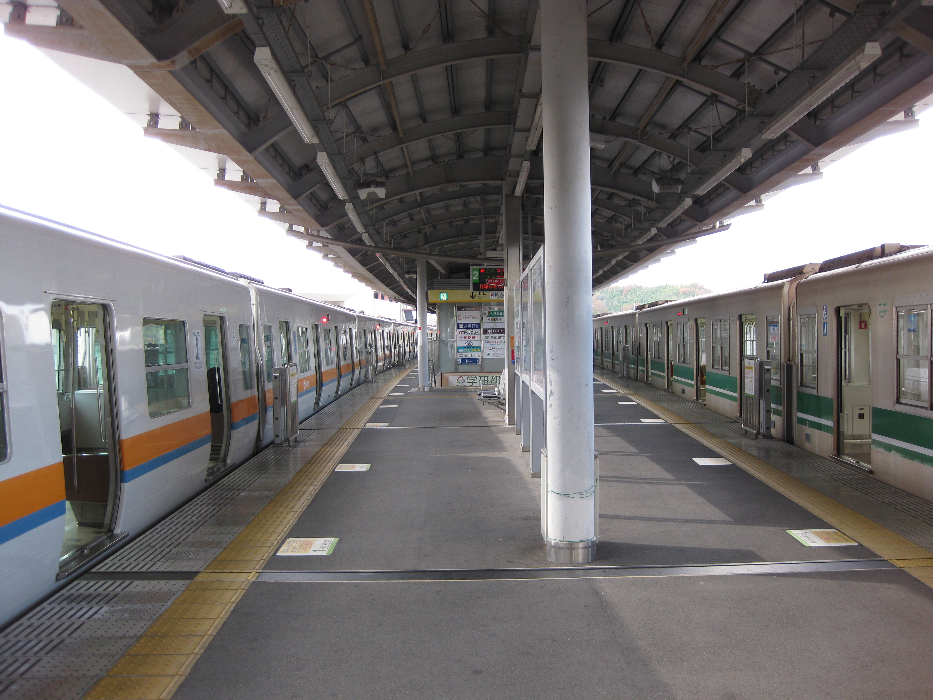 学研奈良登美ヶ丘駅プラットホーム